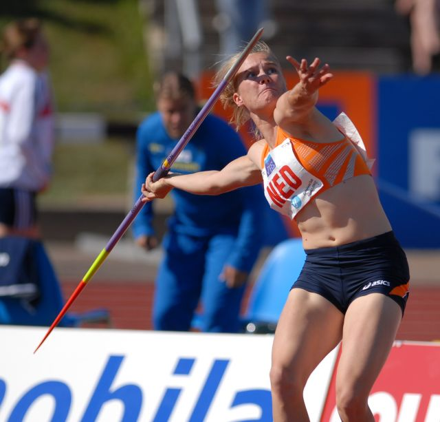 Bregje Crolla during Europacup 2007